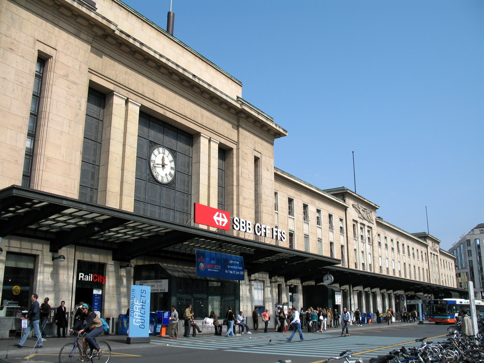 Entrée principale de la gare de Cornavin à Genève